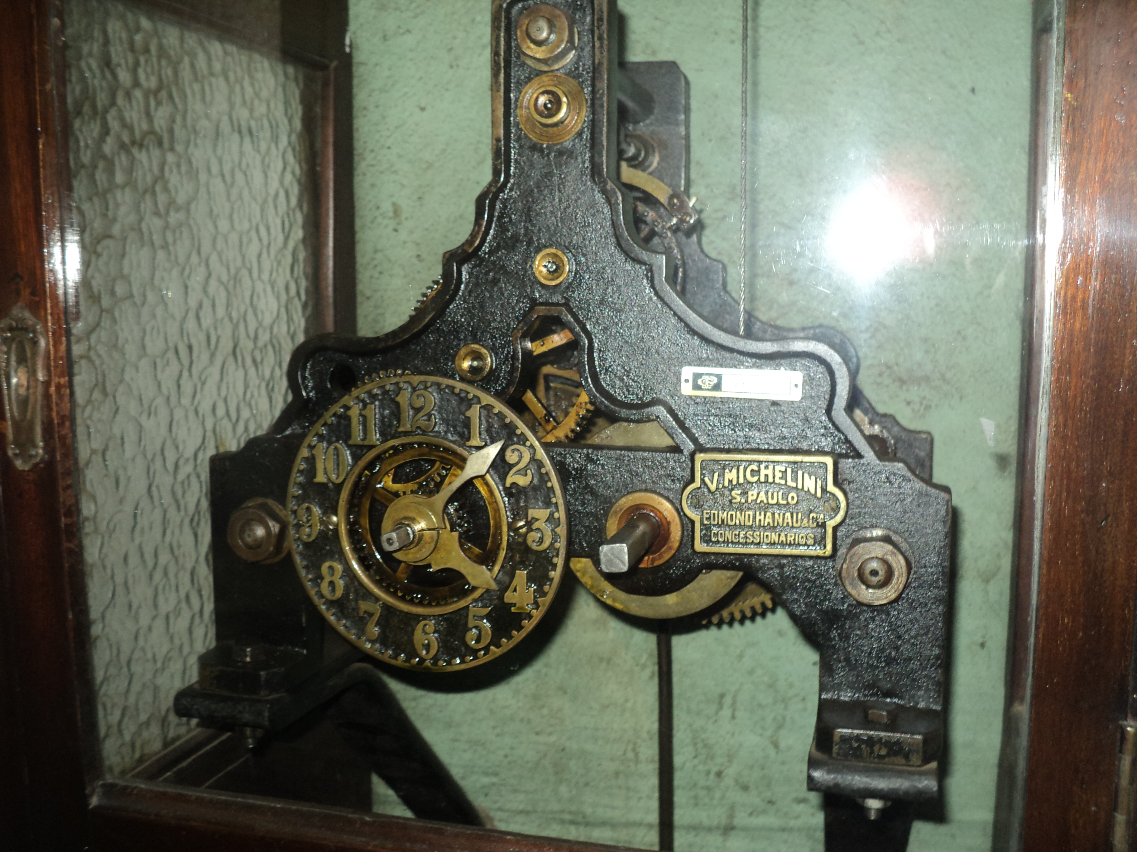 A estação de trem de São Carlos é hoje a Estação Cultura. O mostrador desse relógio fica na antiga plataforma de embarque.